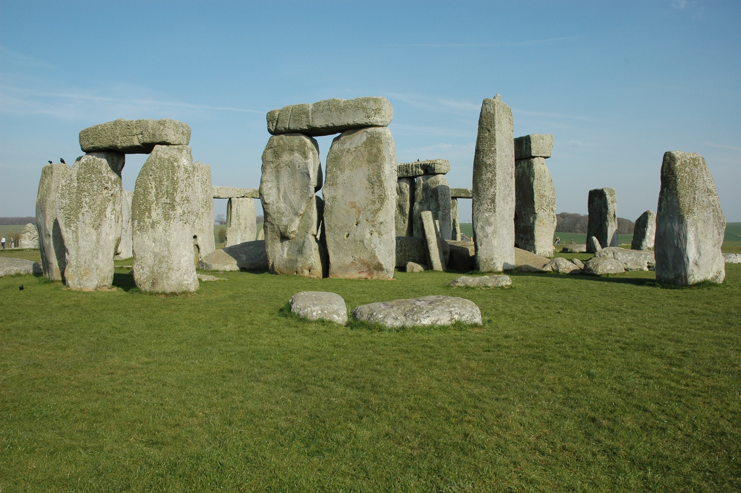 Stonehenge - tarda